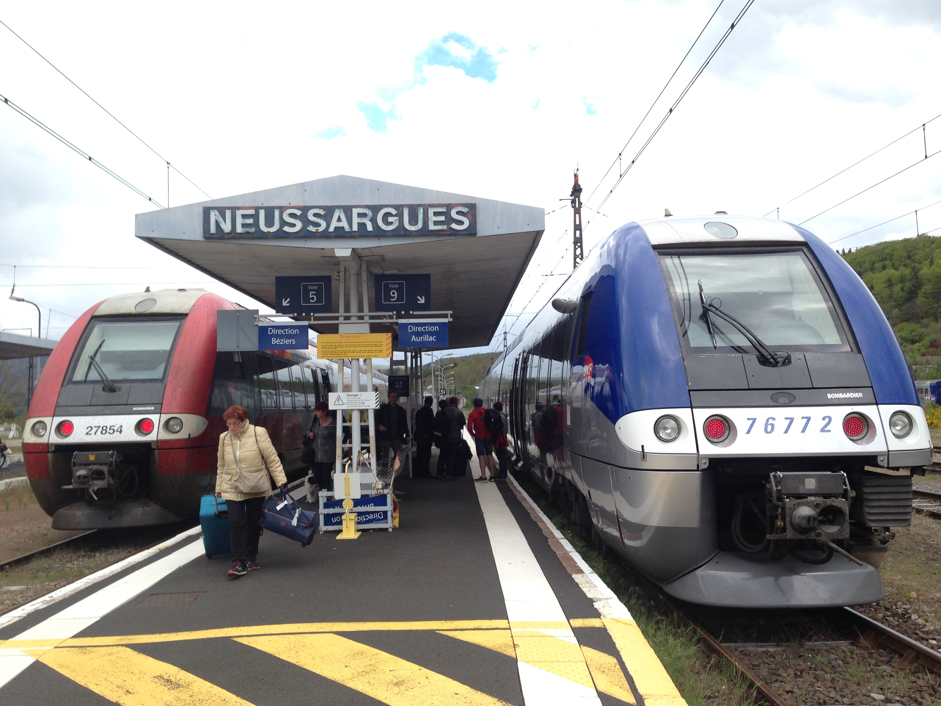 Le quai de la gare de Neussargues